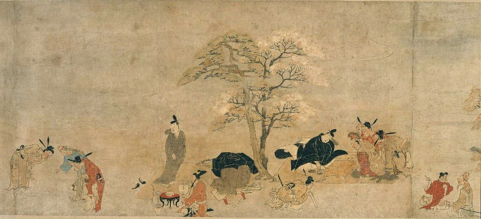 Rouleau 4, scène de la partie de go